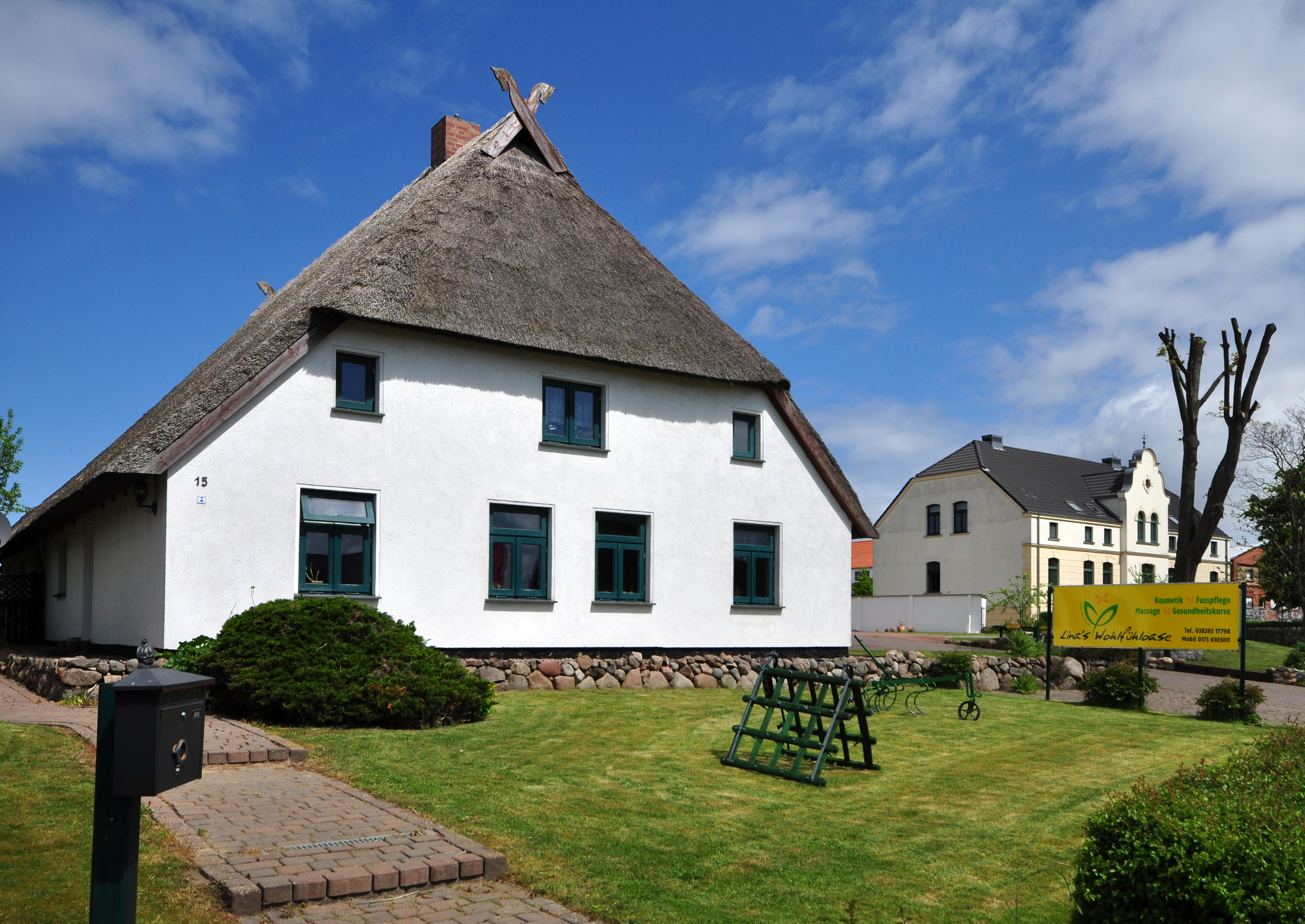 historic building in Bargeshagen, Hauptstraße 15